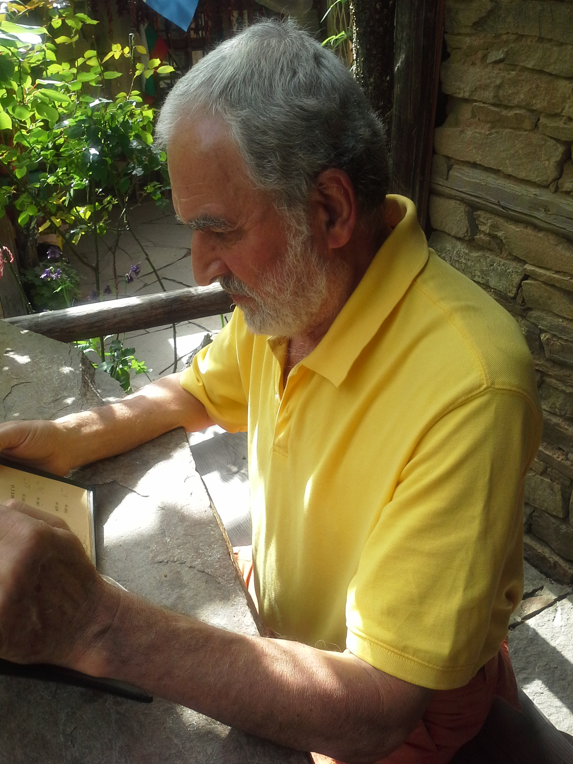 Ванцети Василев 2013